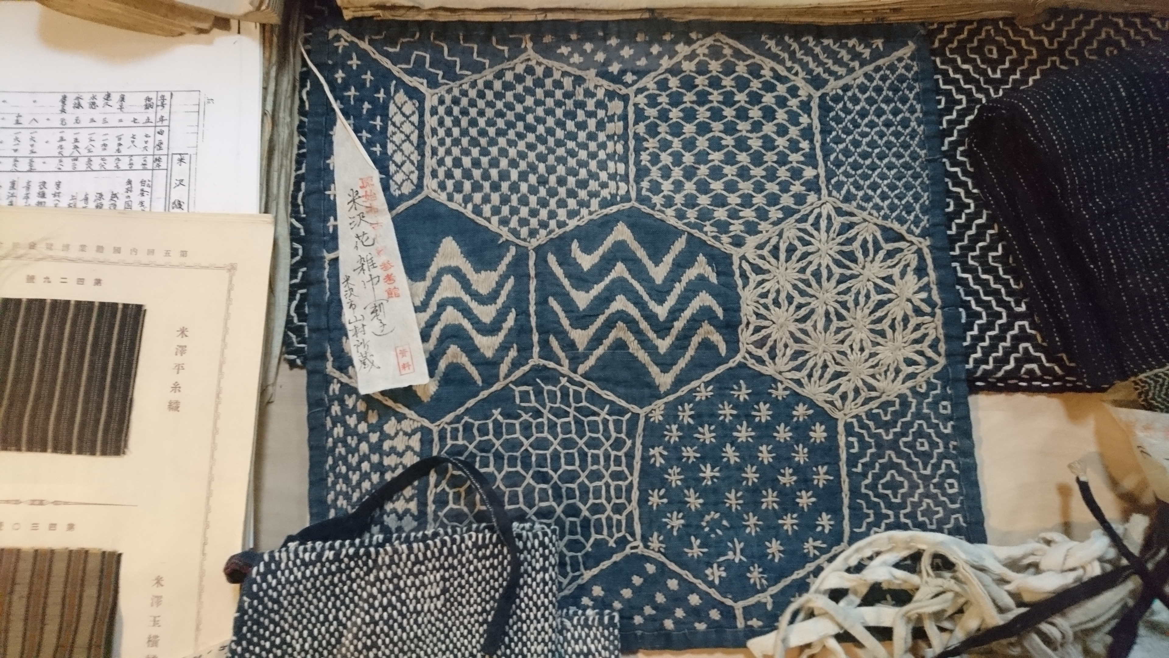 明治期のものと推定される花雑巾（原始布・古代織参考館所蔵）